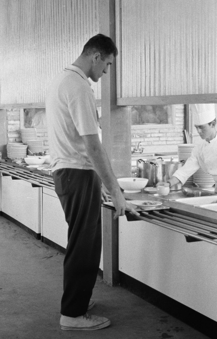 Olympische Spelen te Rome, Russische basketbalspeler Jan Kruminsch langste man van de spelen, de Rus tijdens het eten halen. Location: Italië, Rome